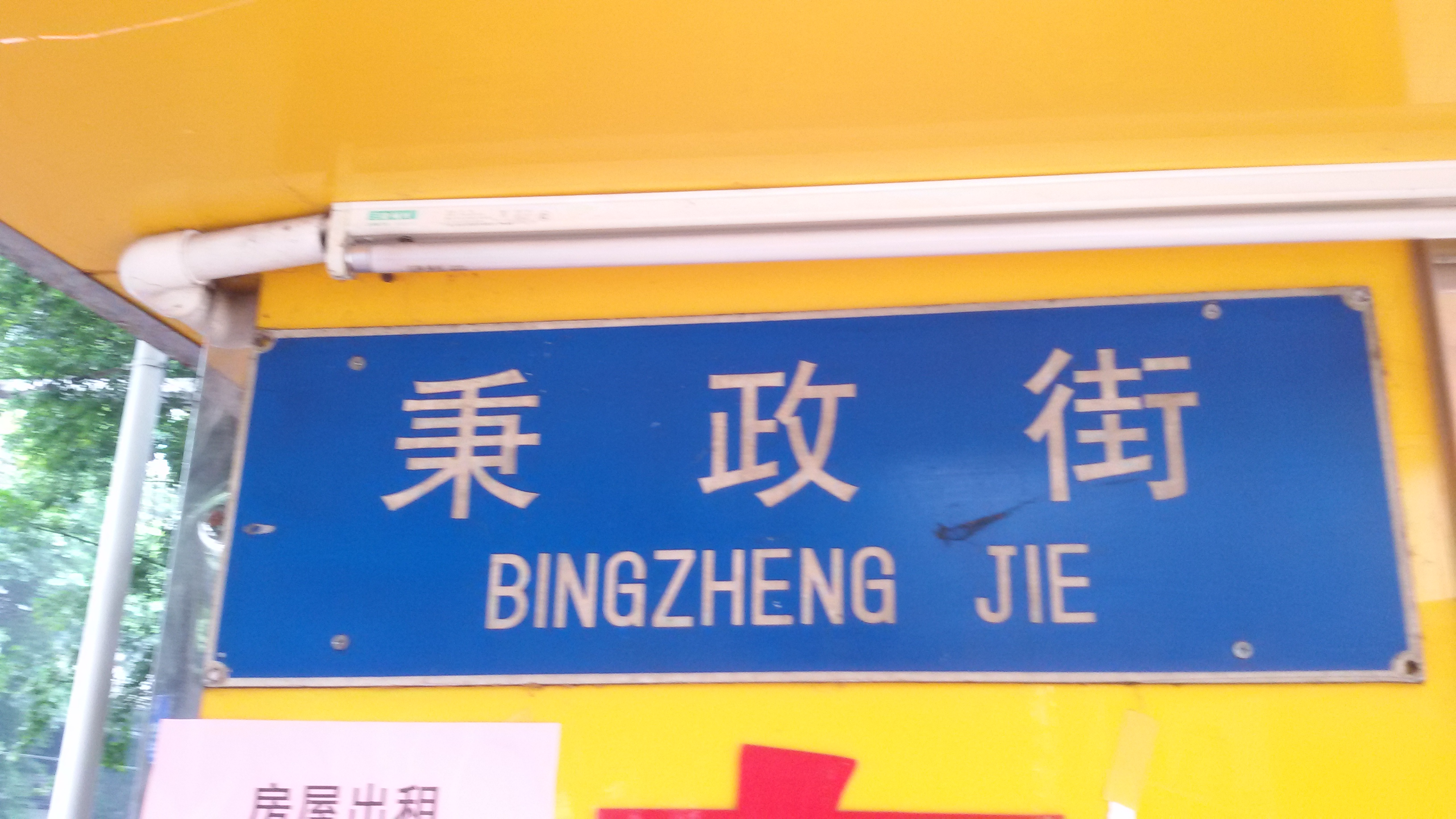 粵語: 秉政街嘅巷牌